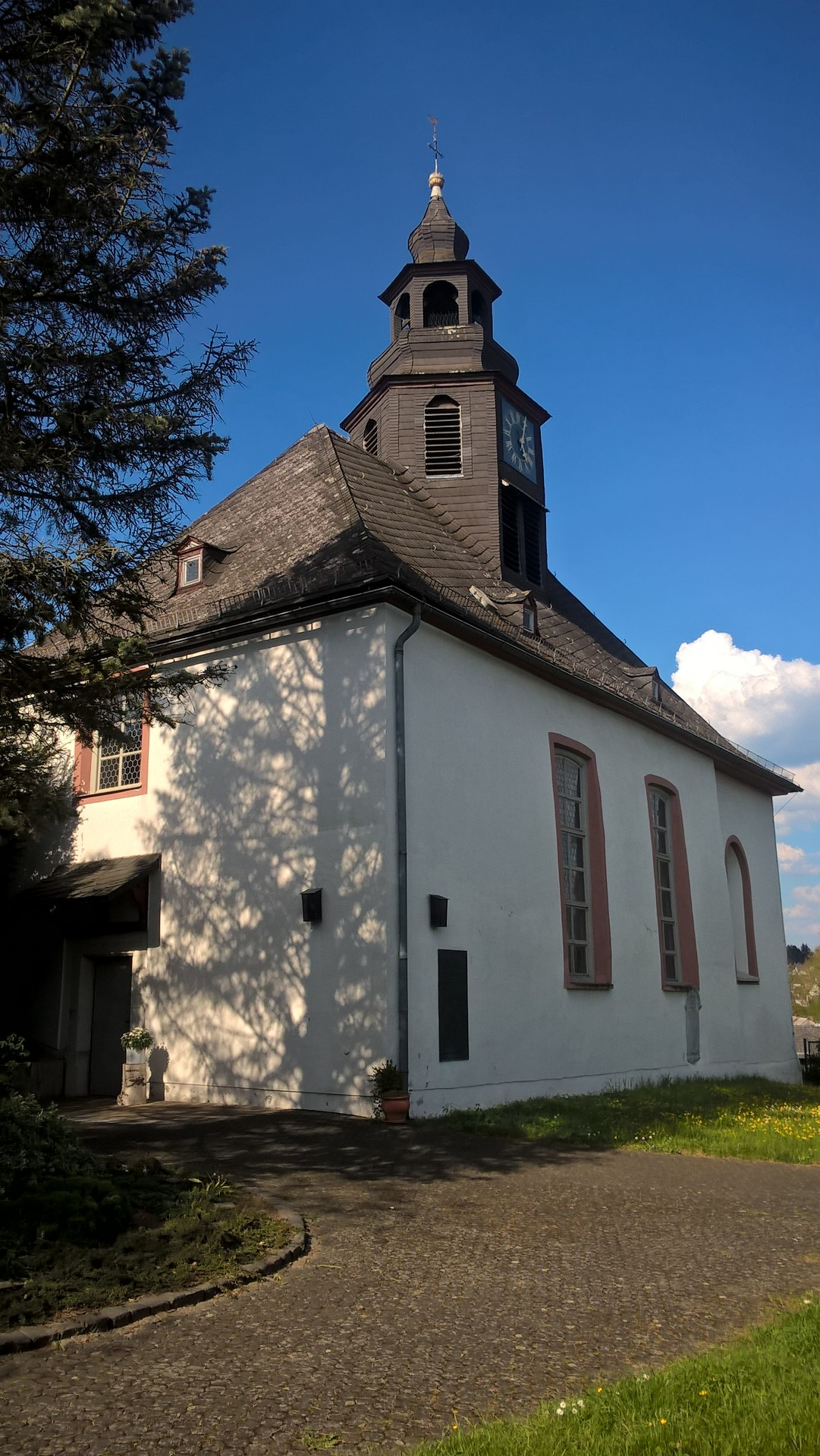 Evangelische Kirche Oberbiel, Solms, Lahn-Dill-Kreis, Hessen, Deutschland